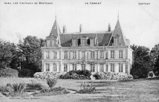 Le château de la Forêt (la Forest) en Loctudy au début du XXe siècle, construit vers 1880 par Alain de Coëtlogon à la place du manoir existant antérieurement, qui fut propriété jusqu'à sa mort en 1865 d'Armand du Boisguéhenneuc, puis entre 1865 et 1875 d'Aimé Briant de Laubrière.